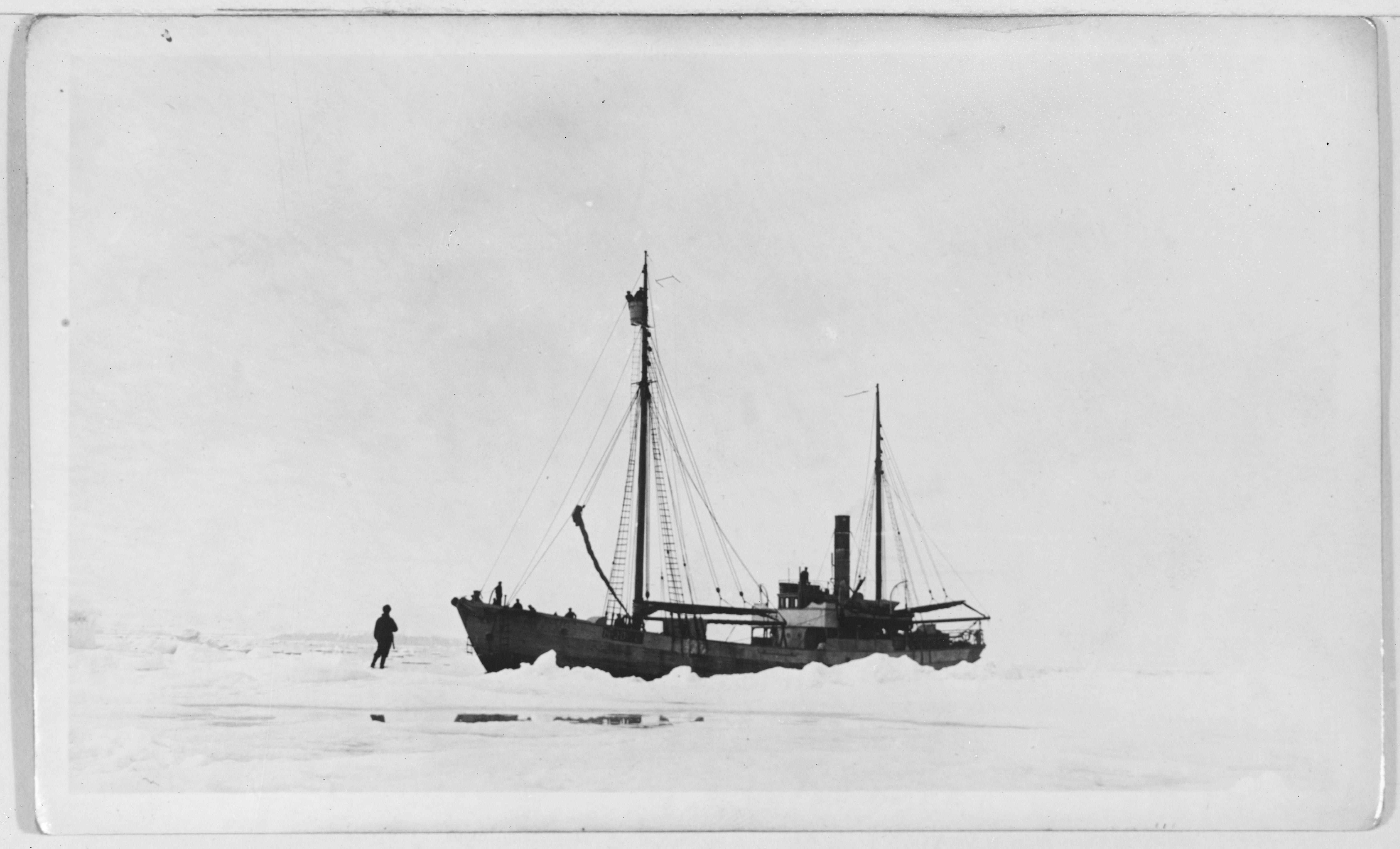 Bildet er hentet fra Nasjonalbibliotekets bildesamling. Anmerkninger til bildet var: Sommeren 1928 ble det satt i gang en leteaksjon etter Roald Amundsen og de andre medlemmene av på flybåten "Latham 47". Dampskipet "Hobby", ishavsdampskipet "Heimland", fiskerioppsynsskipet "Michael Sars", panserskipet "Tordenskjold", krysseren "Strassbourg" og fiskeoppsynsskipet"Quentin Roosevelt" ble sendt langs den vestlige rute. Ishavsskuta "Veslekari", under ishavsskipper Johan Olsen ble sendt langs den østlige rute. "Veslekari"-ekspedisjonen ble finansiert med bidrag fra det norske folk. Depicted person